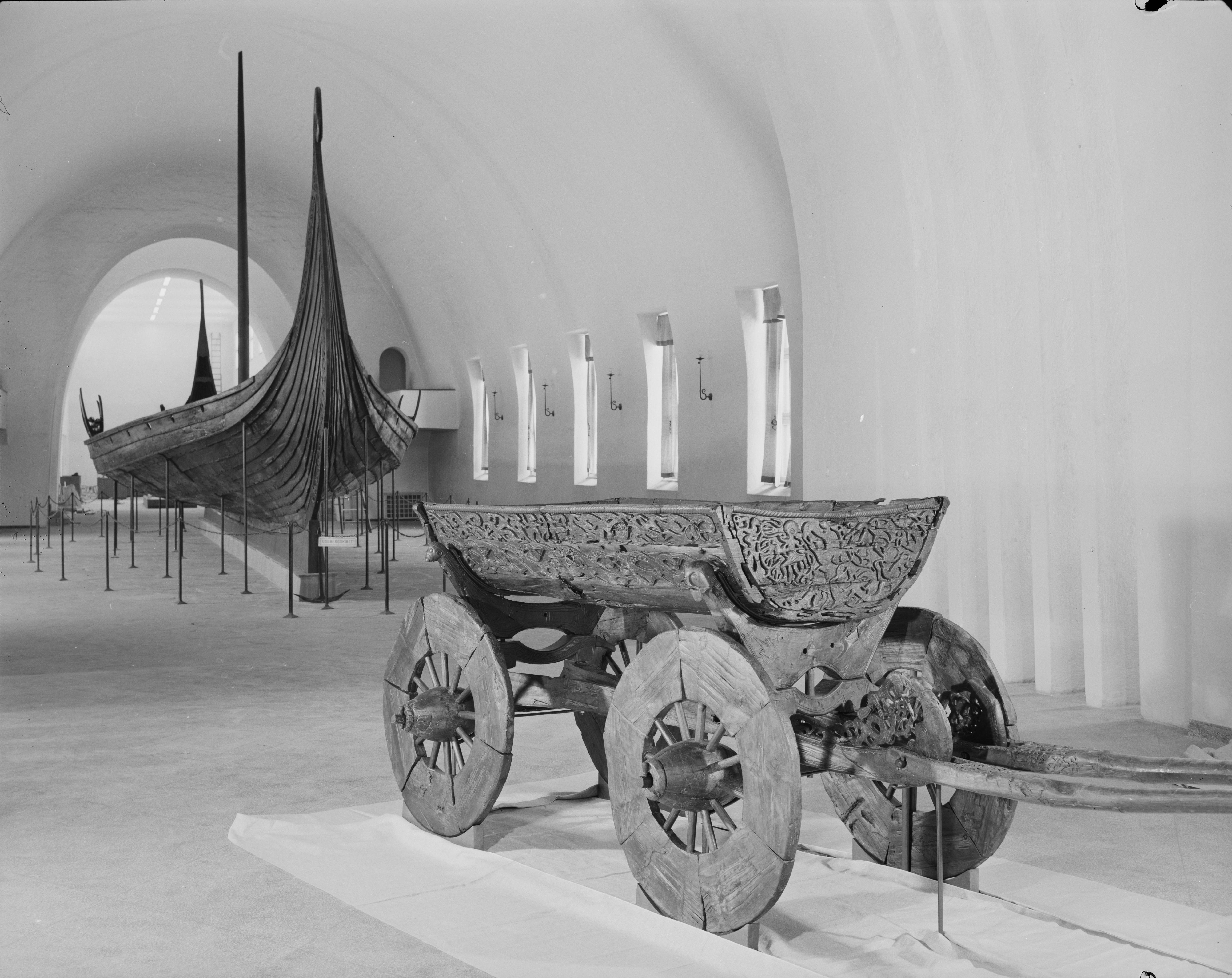 Bildet er hentet fra Nasjonalbibliotekets bildesamling Bygdøy,Oslo, Oslo, Oslo